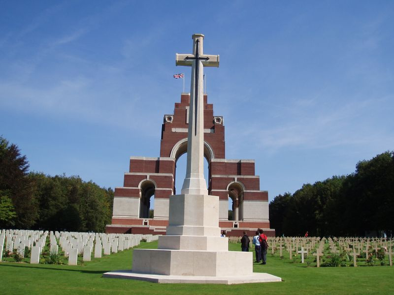 Thiepval (Somme, France) Le Mémorial, vu du côté du cimetière avec au premier plan la grande croix de pierre blanche (Croix du sacrifice).